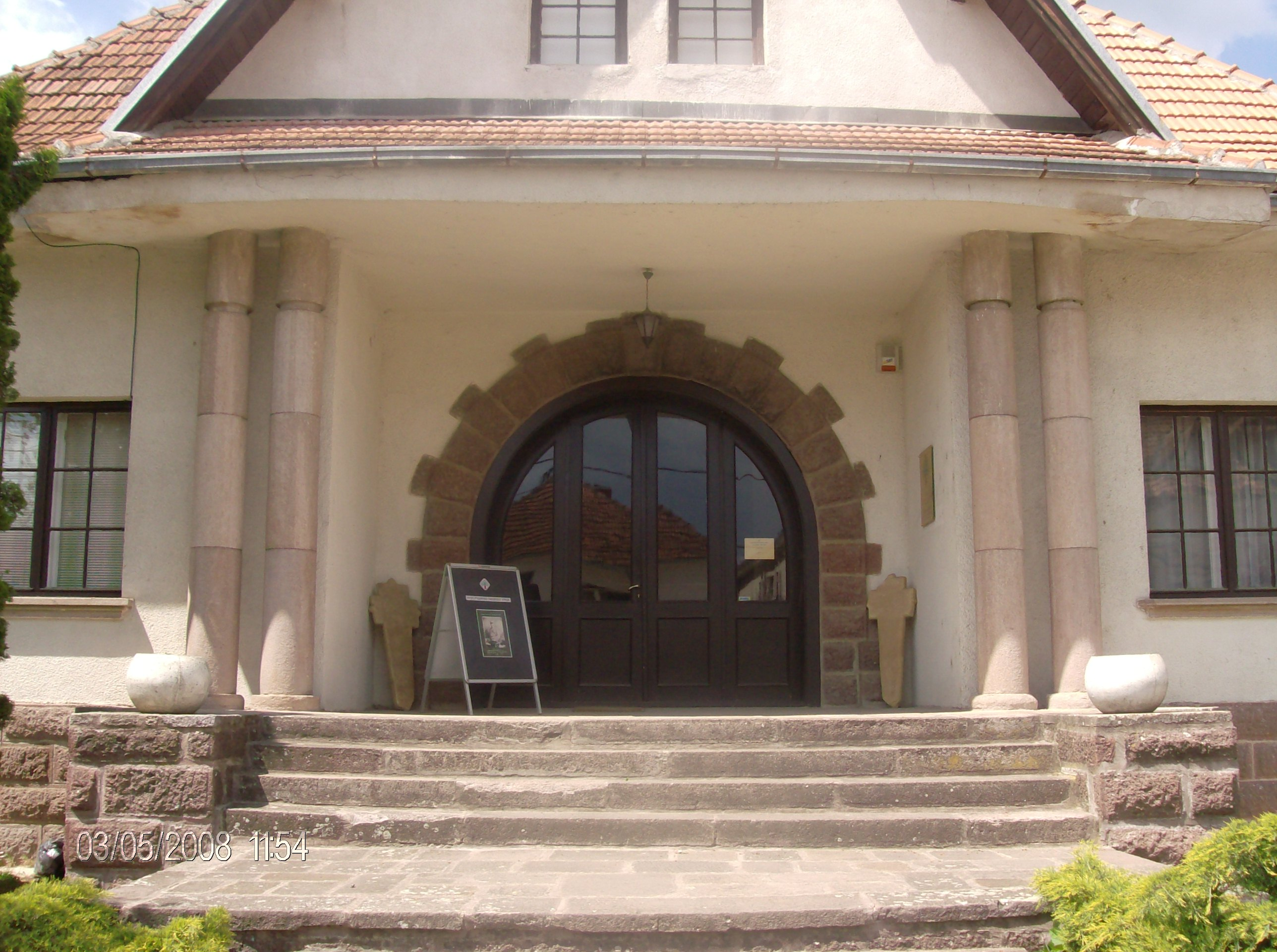 Muzej Rudnicko-takovskog kraja u Gornjem Milanovcu